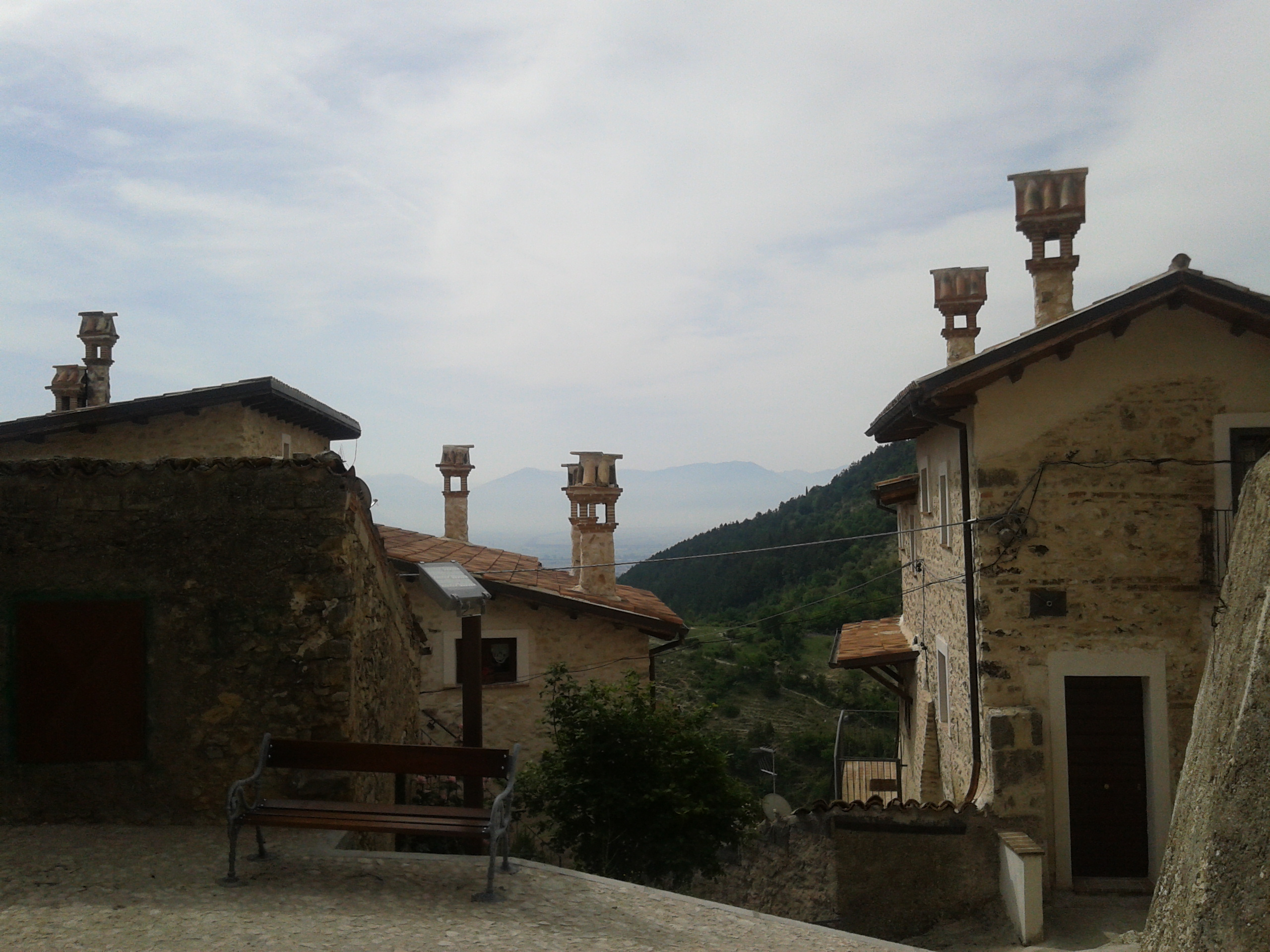 Scorcio fotografico di Santa Jona